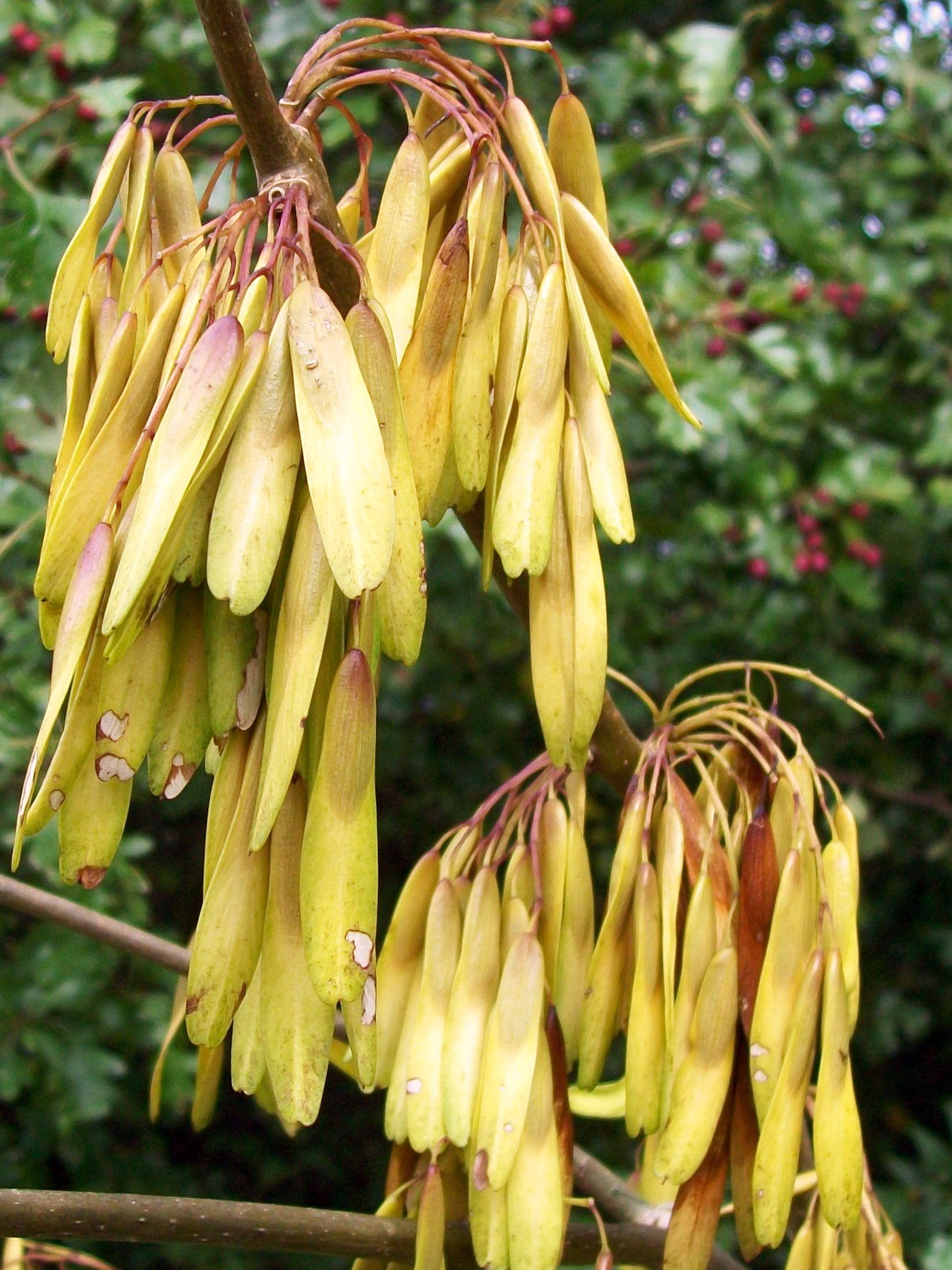 Fraxinus excelsior